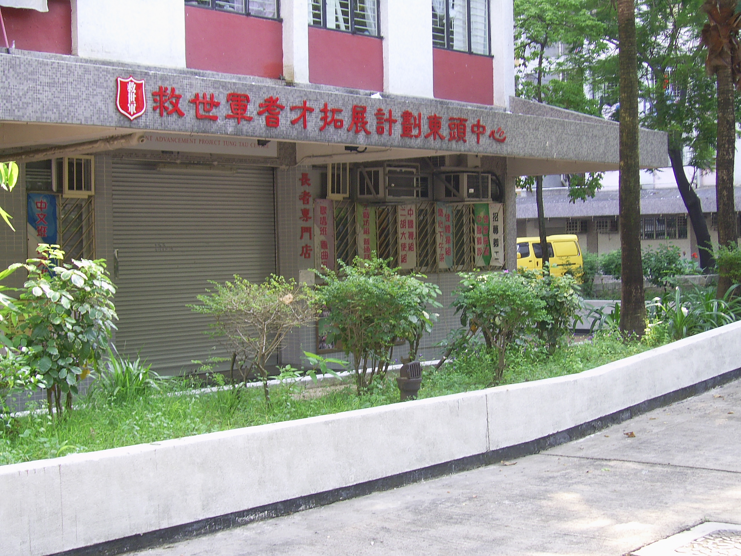 中文（香港）: 香港救世軍耆才拓展計劃東頭中心